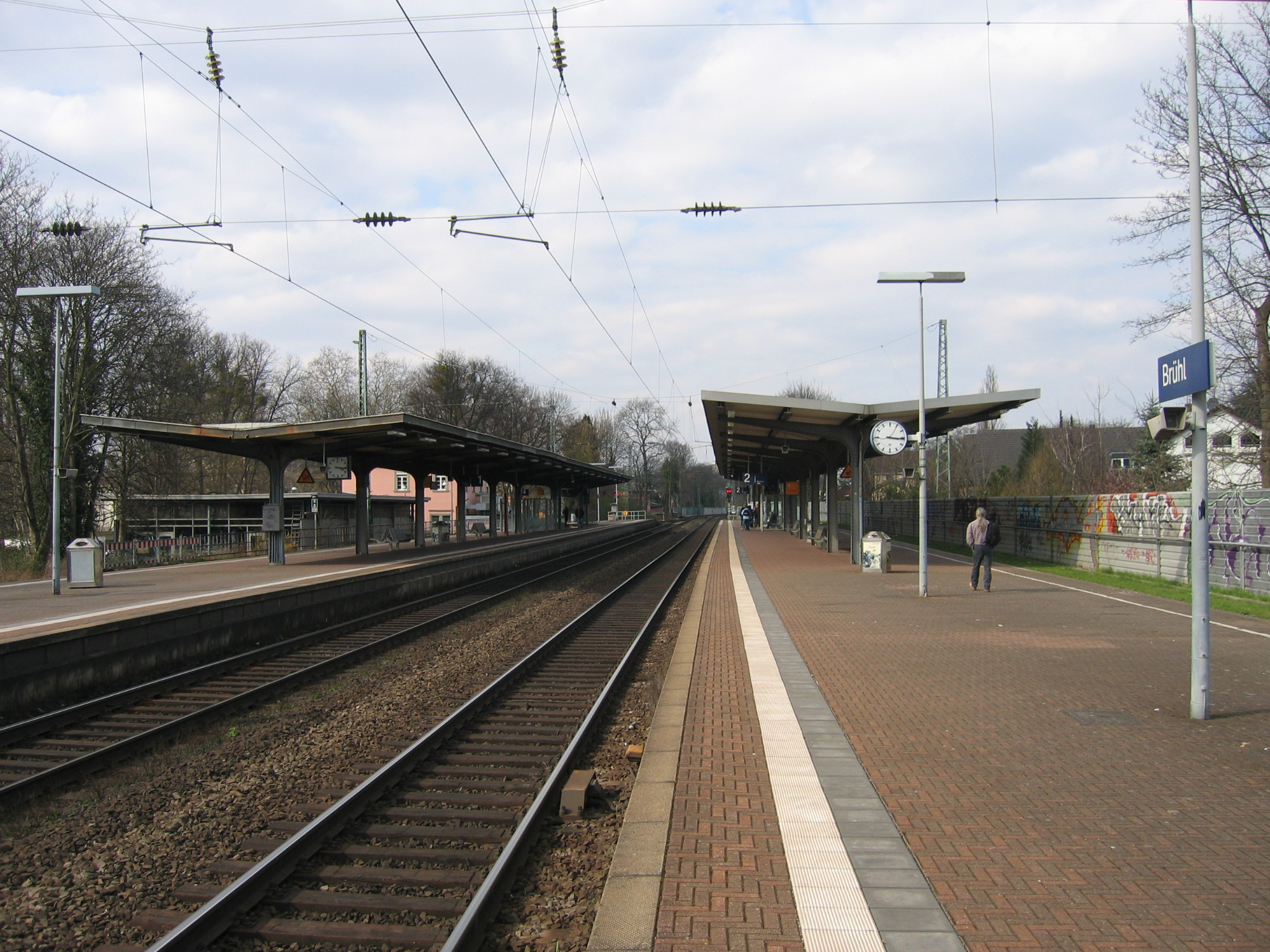 Bahnhof Brühl, Rhein-Erft-Kreis